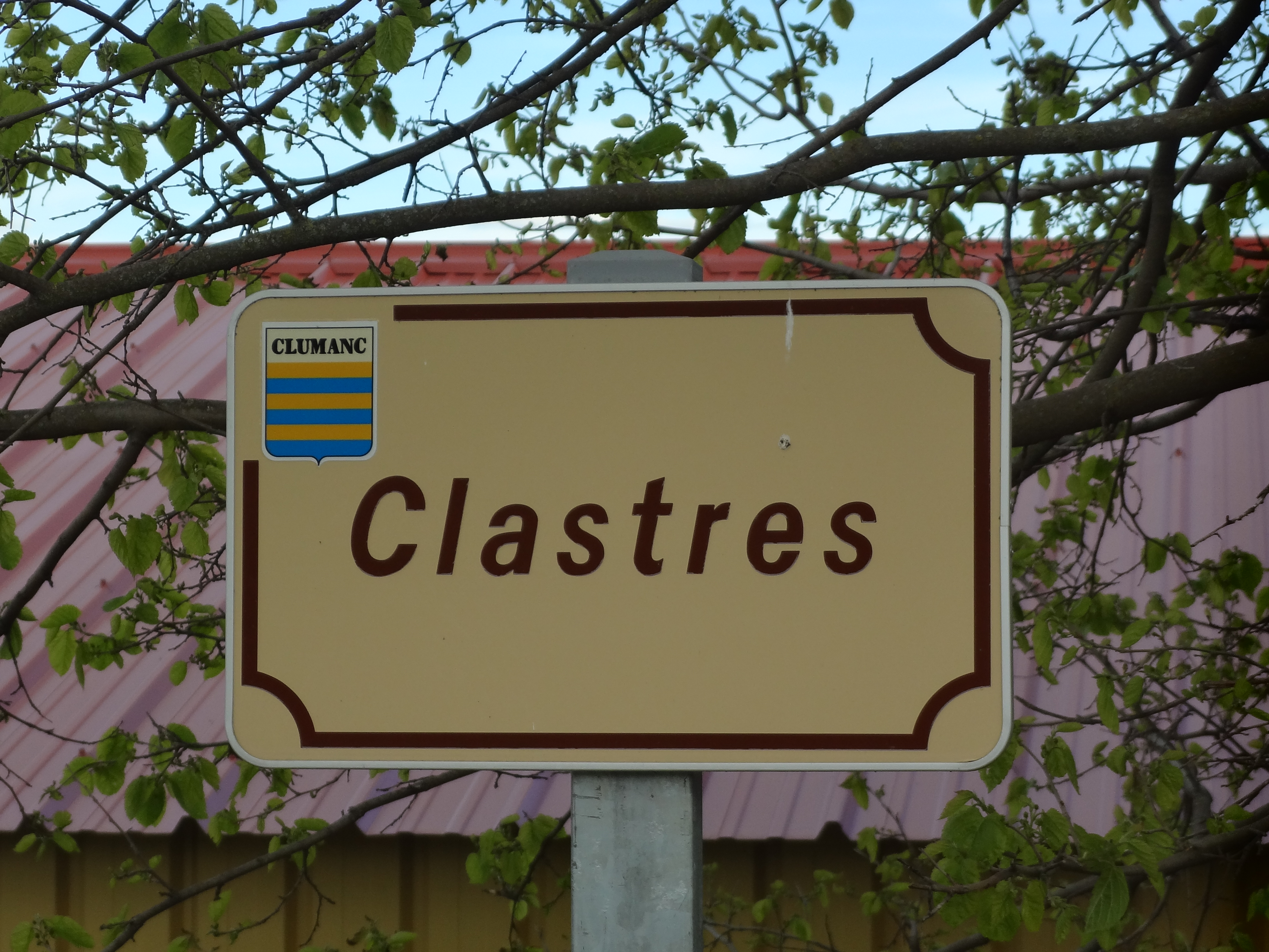 Panneau indicateur du lieu-dit Clastres à Clumanc (France). La commune utilise ses armoiries sur la signalisation de voirie.